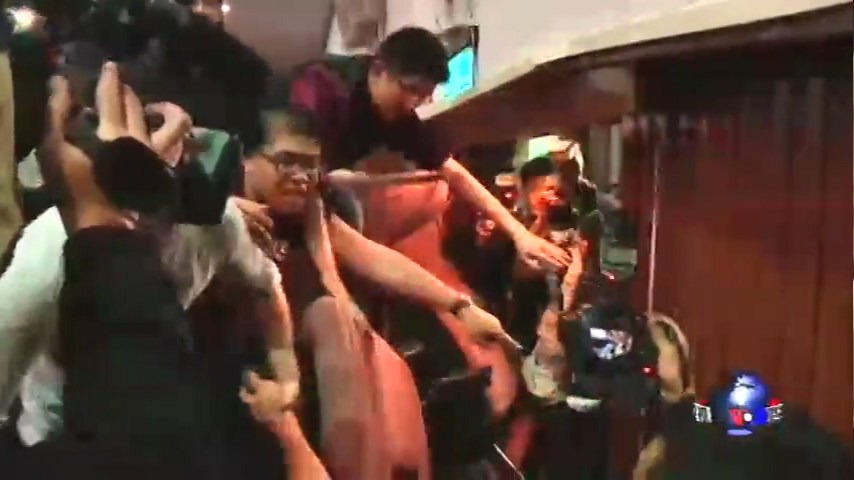 中文（台灣）: 被佔領的議場情況。